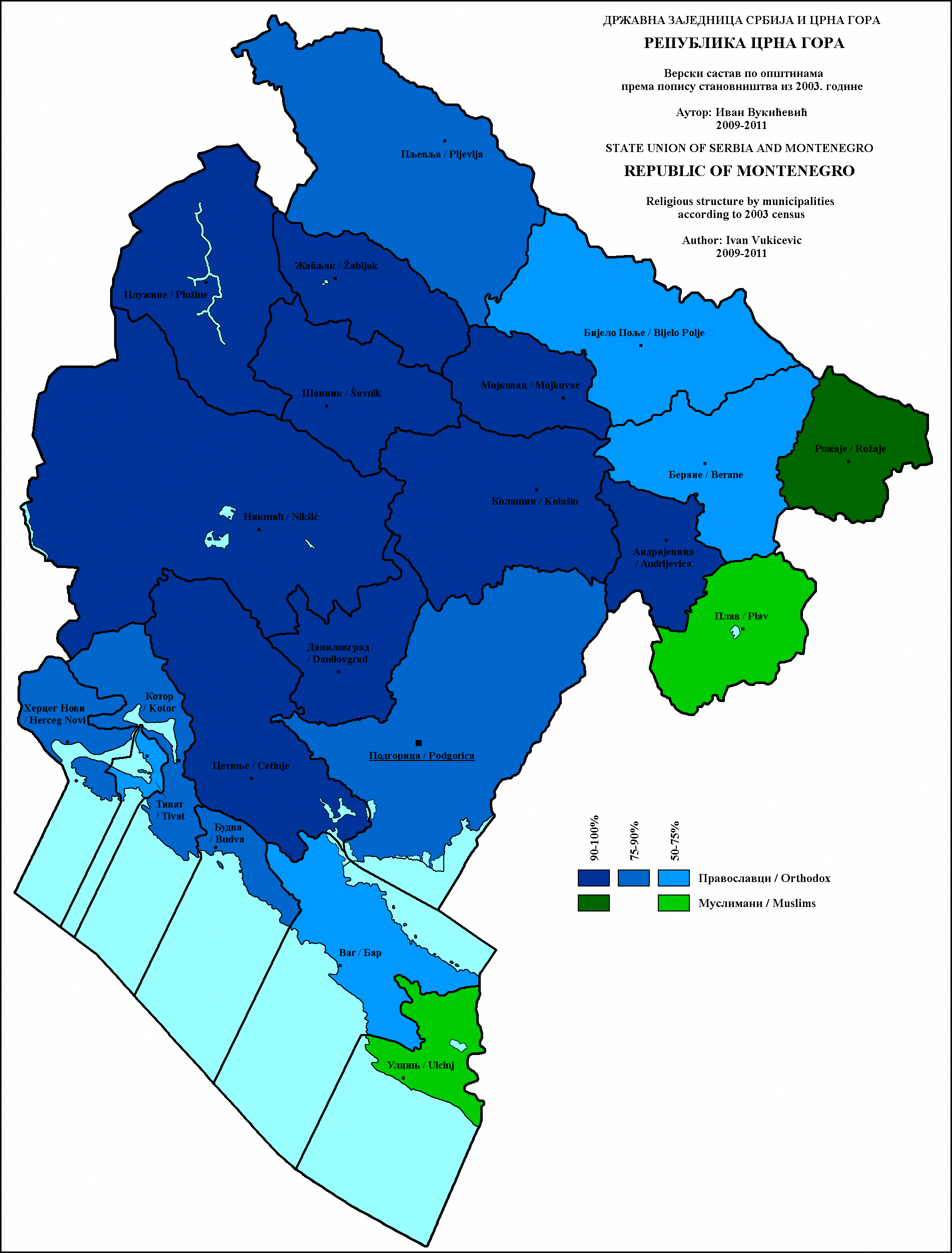 Верски састав Црне Горе по општинама 2003. године. Аутор: Иван Вукићевић